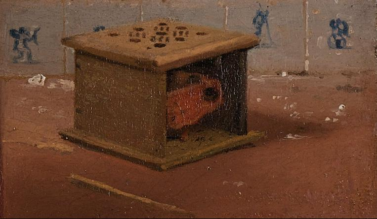 Vermeer, La Laitière. Détail de la chaufferette et de la plinthe